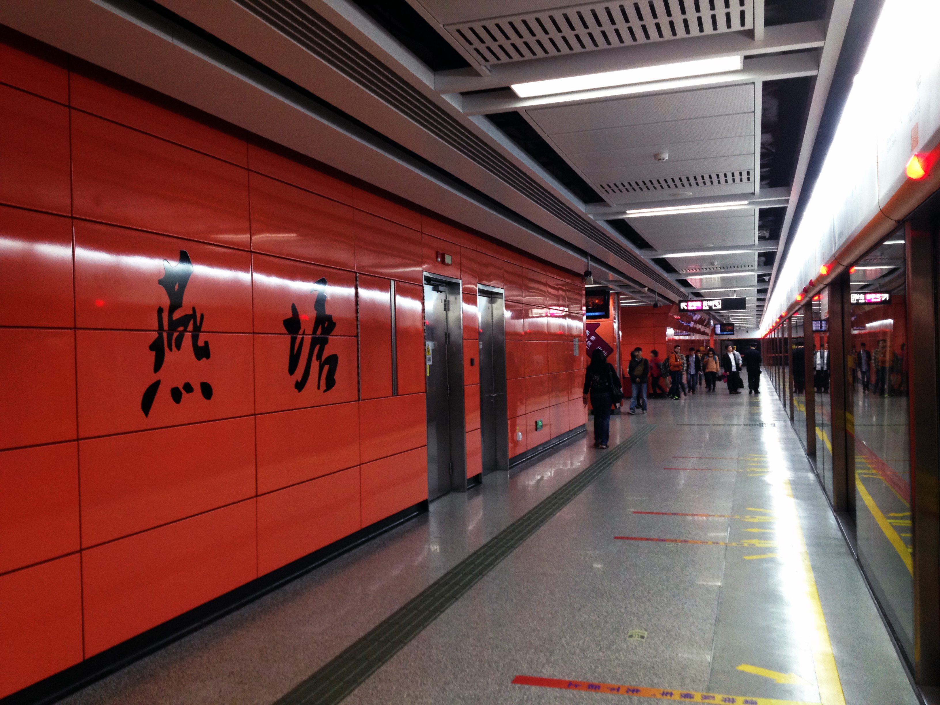 广州地铁3号线燕塘站往番禺广场方向的月台